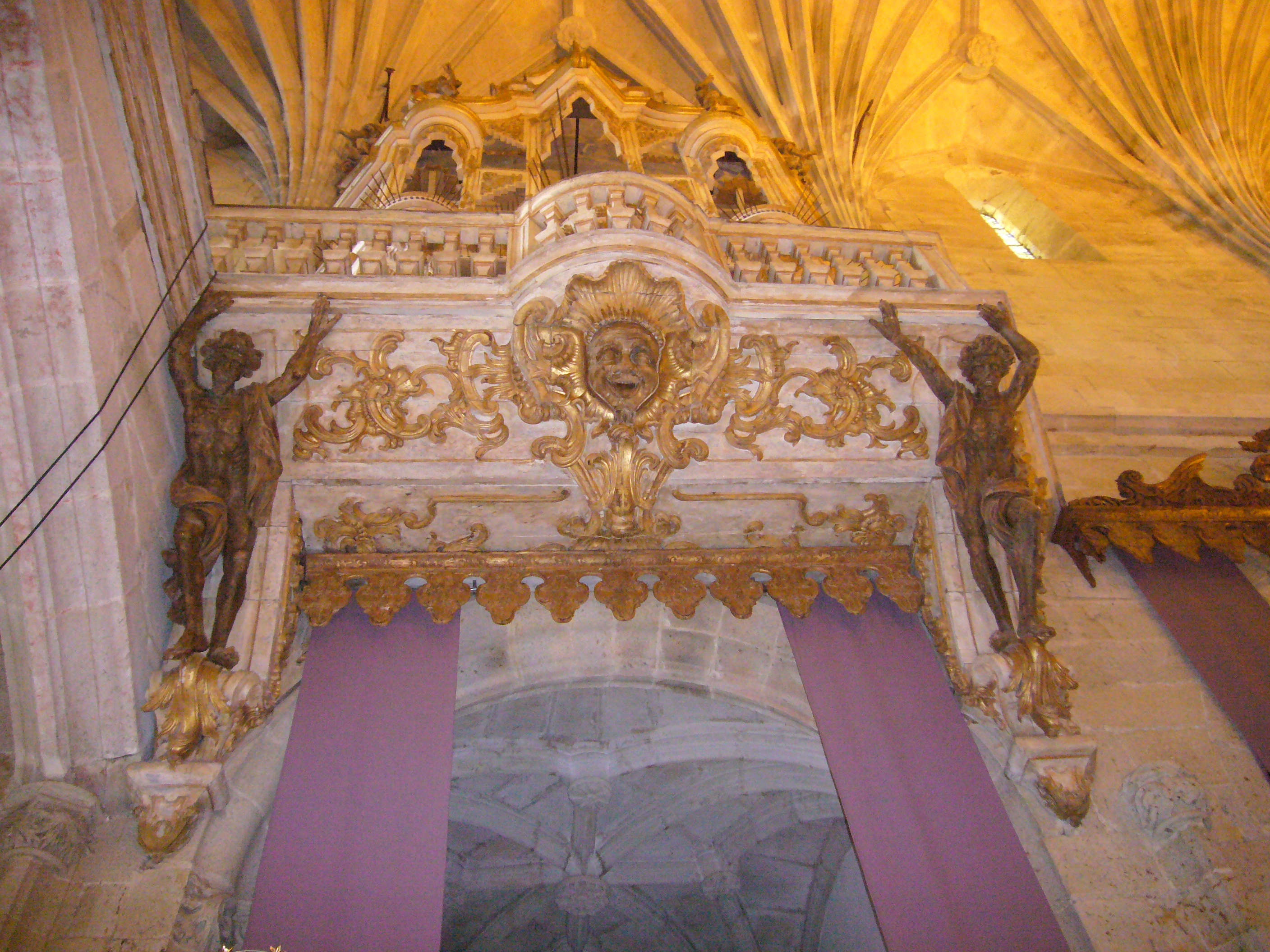 Órgão da Igreja de Vilar de Frades